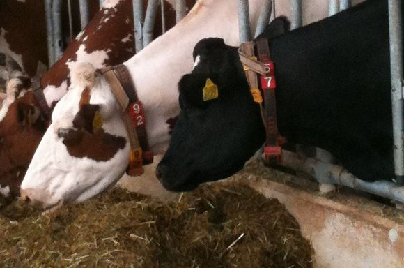 Transponderhalsbänder an 2 Kühen, der besuchte Betrieb verfügte über einen Melkroboter. Dieser erkennt die Kuh, prüft ob sie gemolken werden muss und dosiert ihr eine individuelle Menge Futter in den Trog.